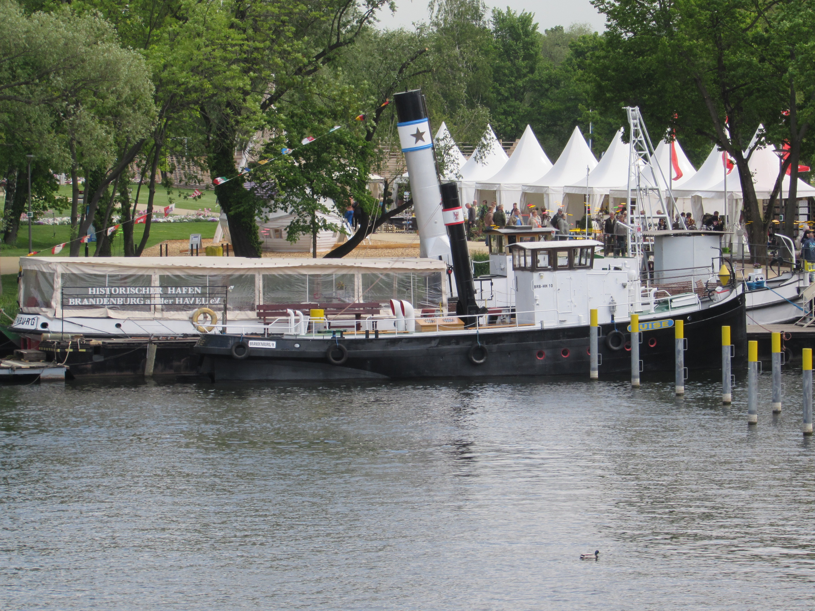 die dampfschlepper nordstern und luise auf der bundesgartenschau 2015 in brandenburg an der havel